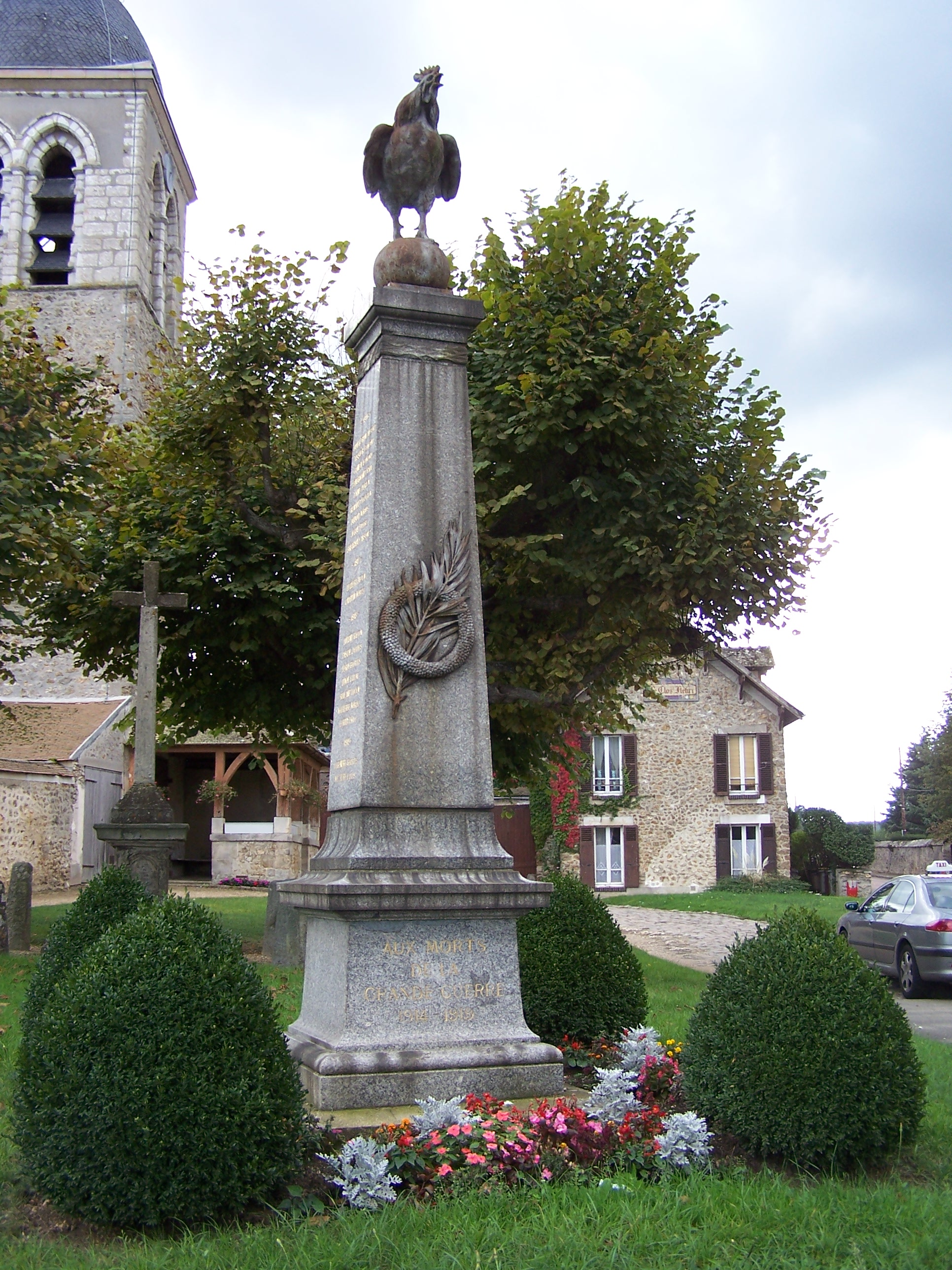 Monument aux morts de Jouars-Pontchartrain (Yvelines, France)